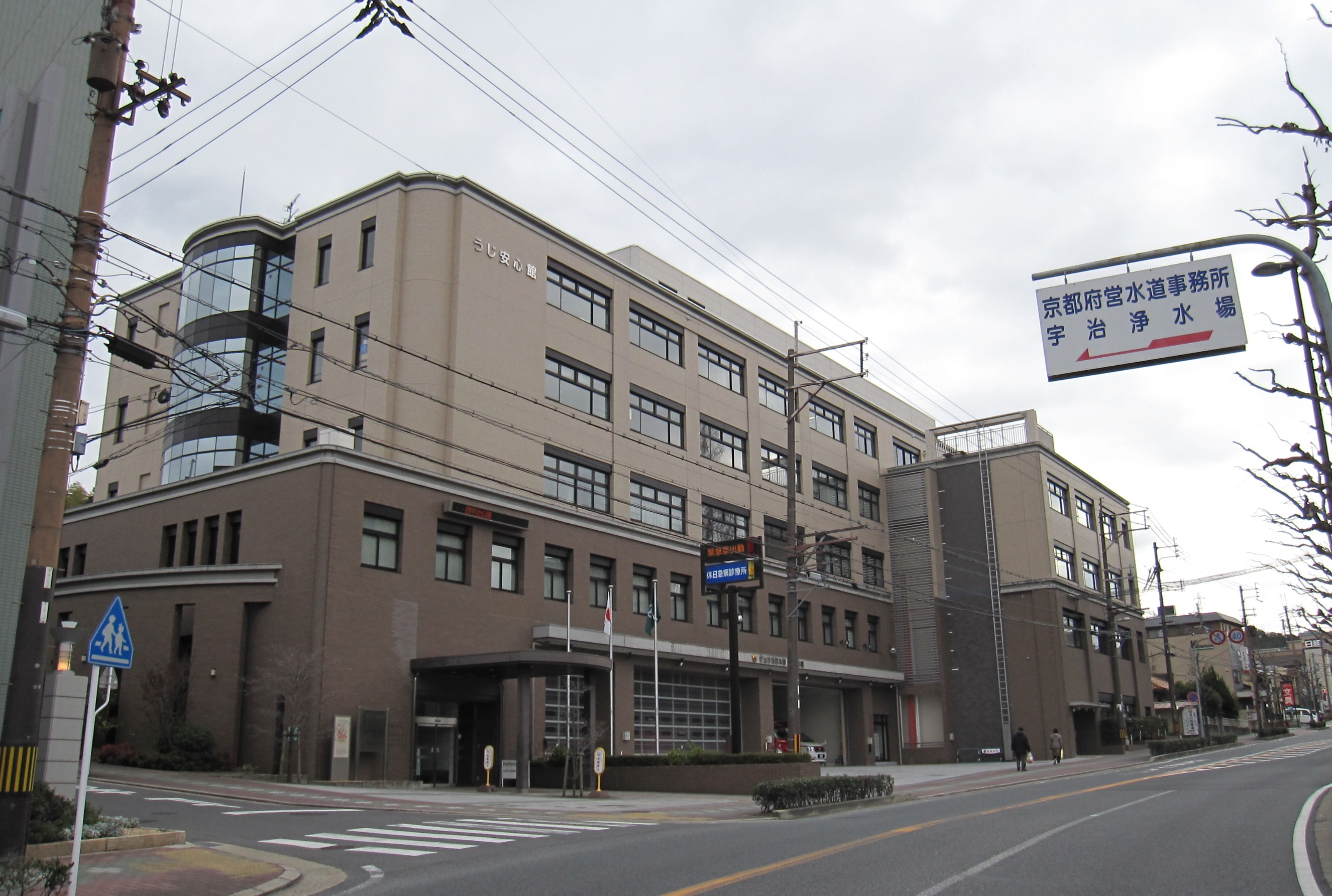 宇治市消防本部庁舎